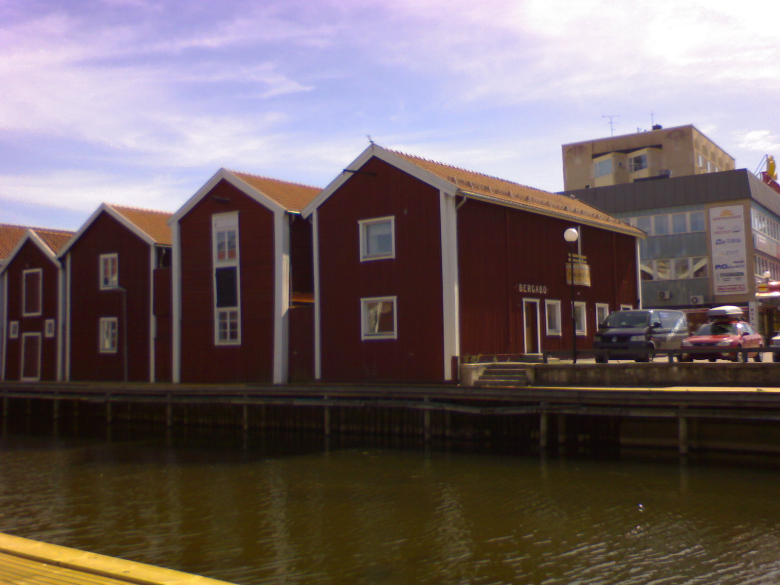 Sjöbodarna, Strömmingssundet i Hudiksvall.